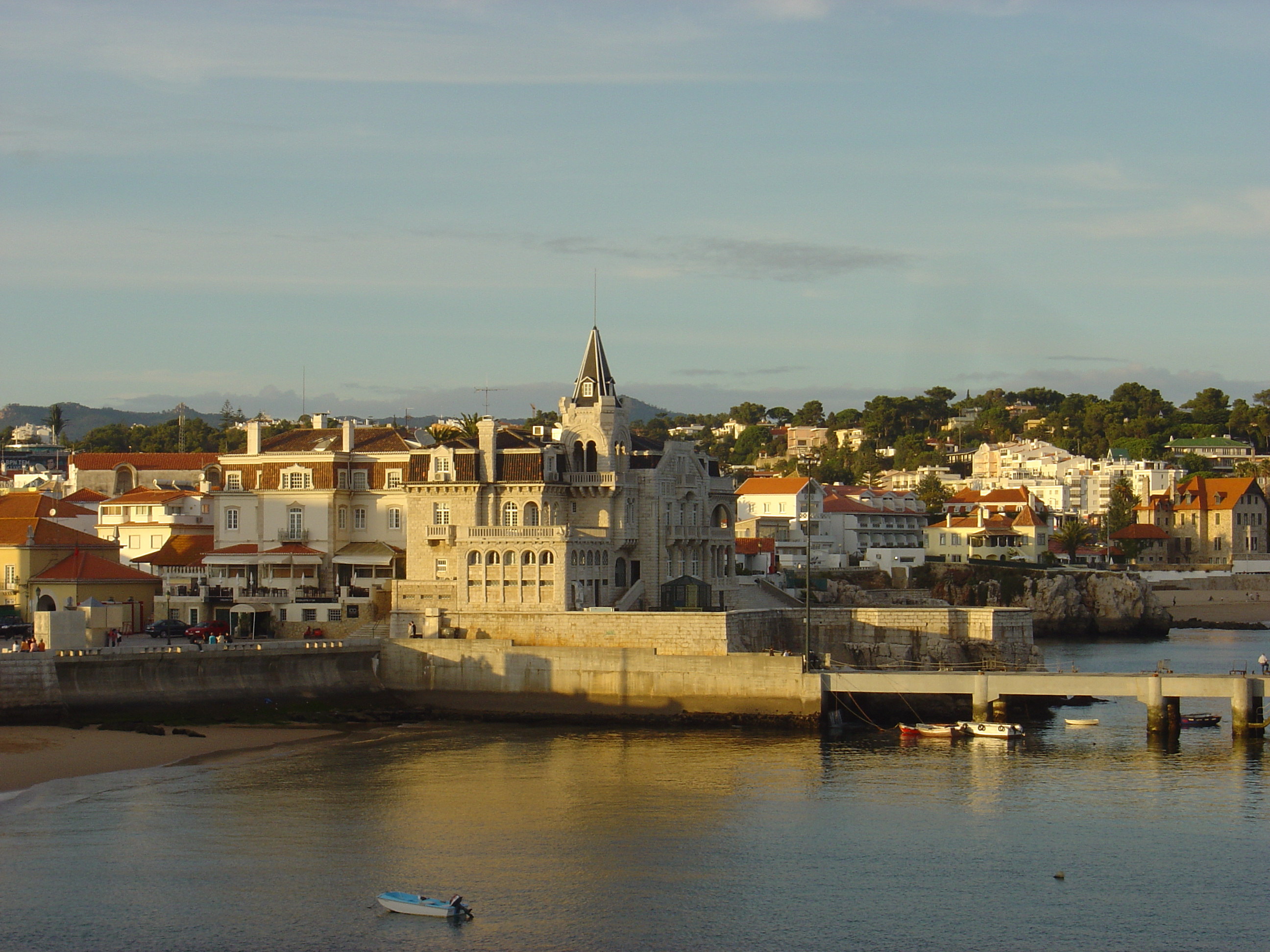 Capitania, Cascais, Portugal